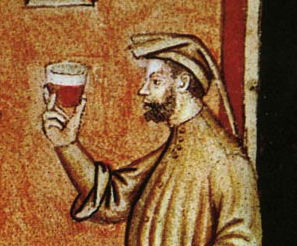 Alimenti: vino rosso, dal Taccuino Sanitatis, Manoscritto Casanatense 4182 (XIV secolo).